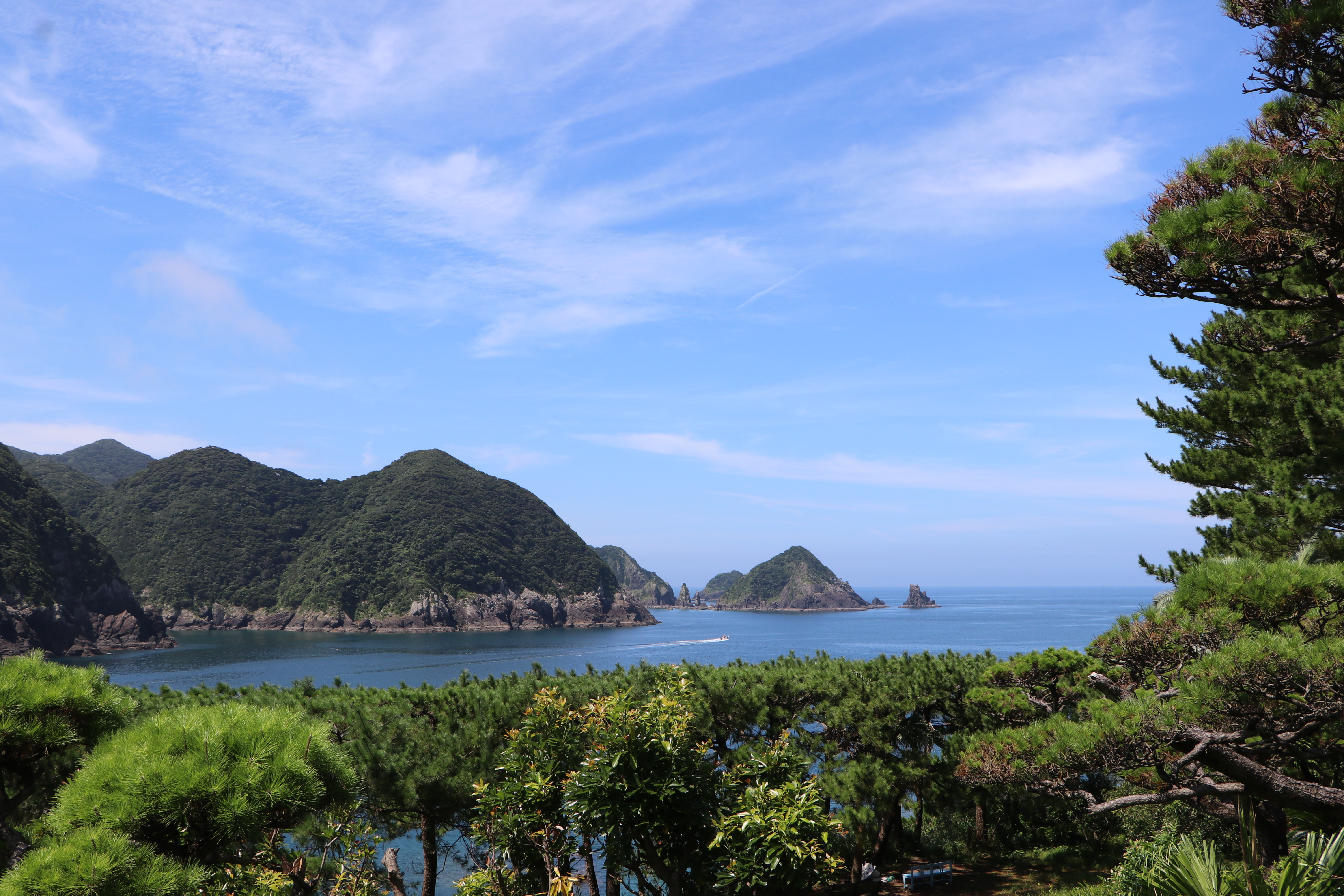 国指定名勝「坊津」を構成するリアス式海岸と双剣石